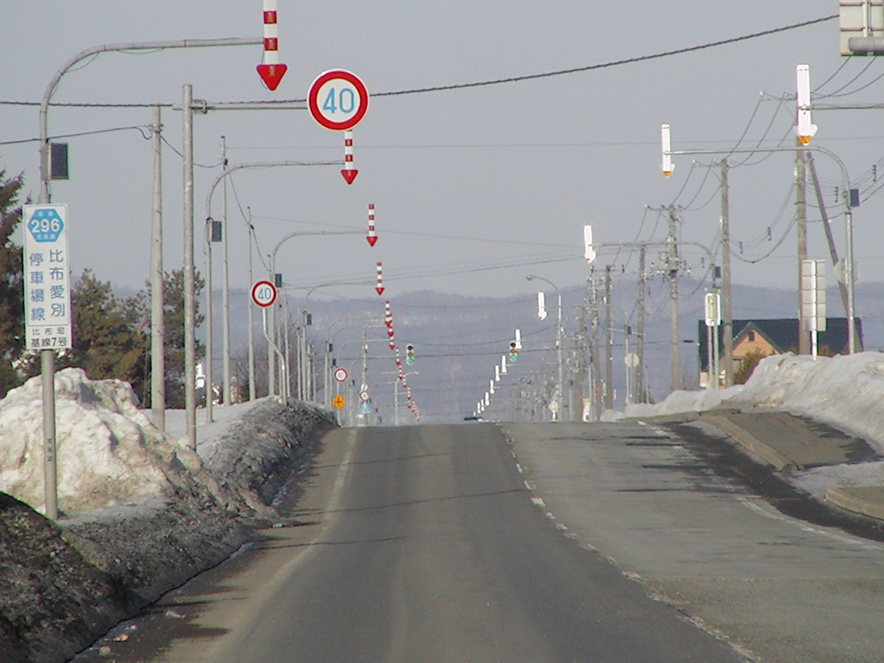 道道296号を比布町基線より愛別方面に向けて撮影